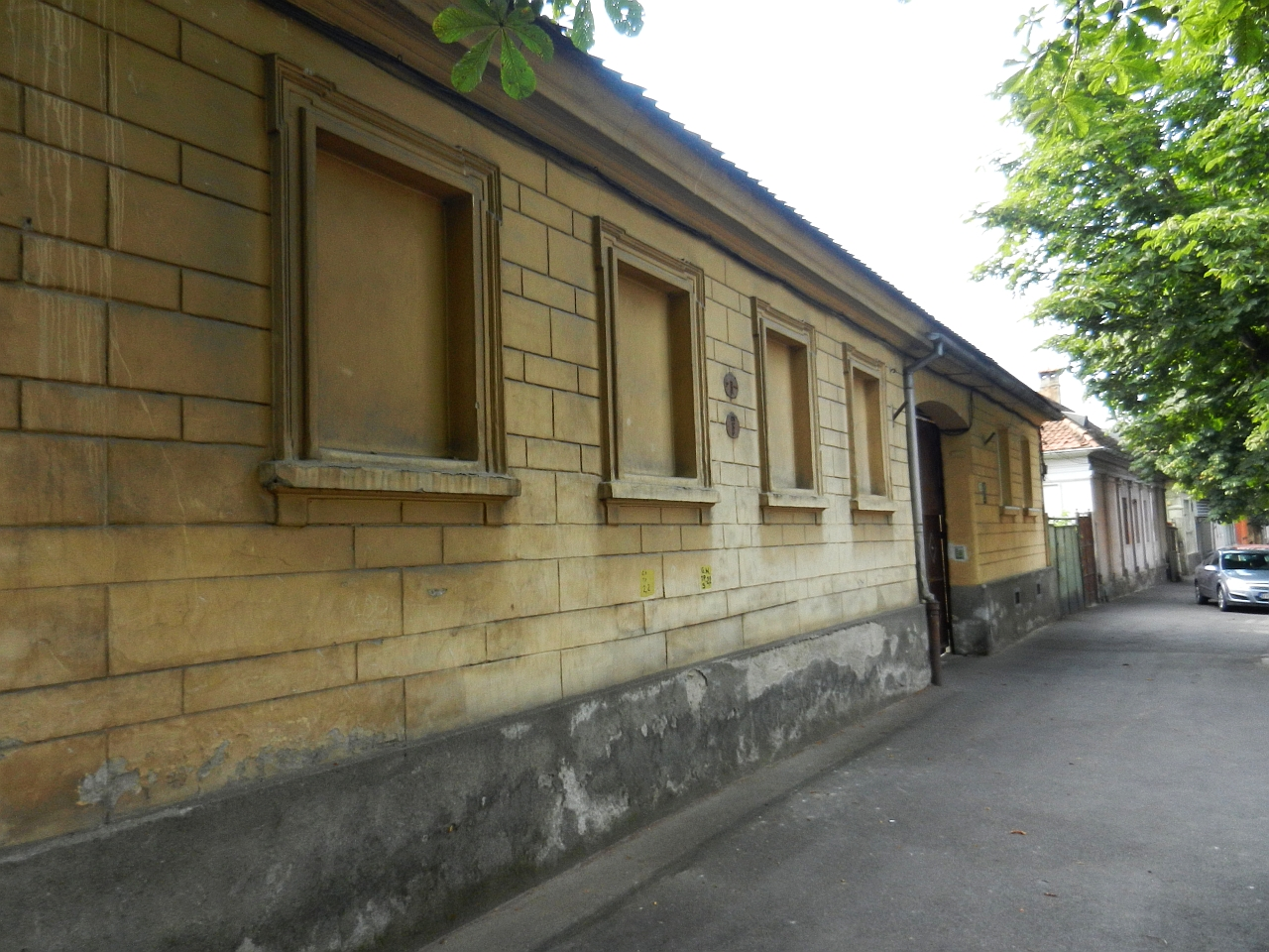 Casa monument istoric (Lunga 121)